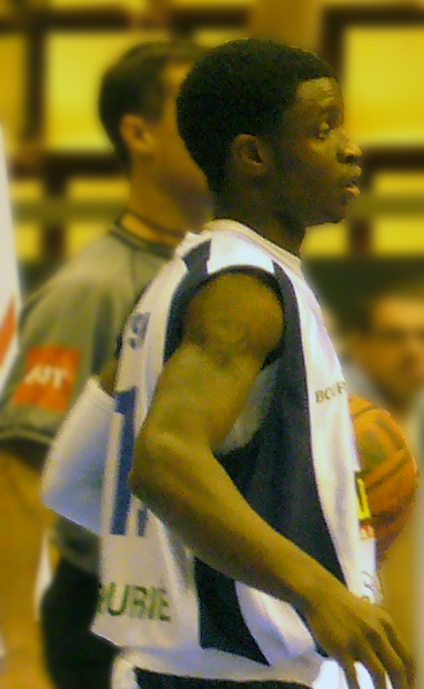 Le joueur nigérian de basket-ball Tony Skinn (Stade Clermontois)